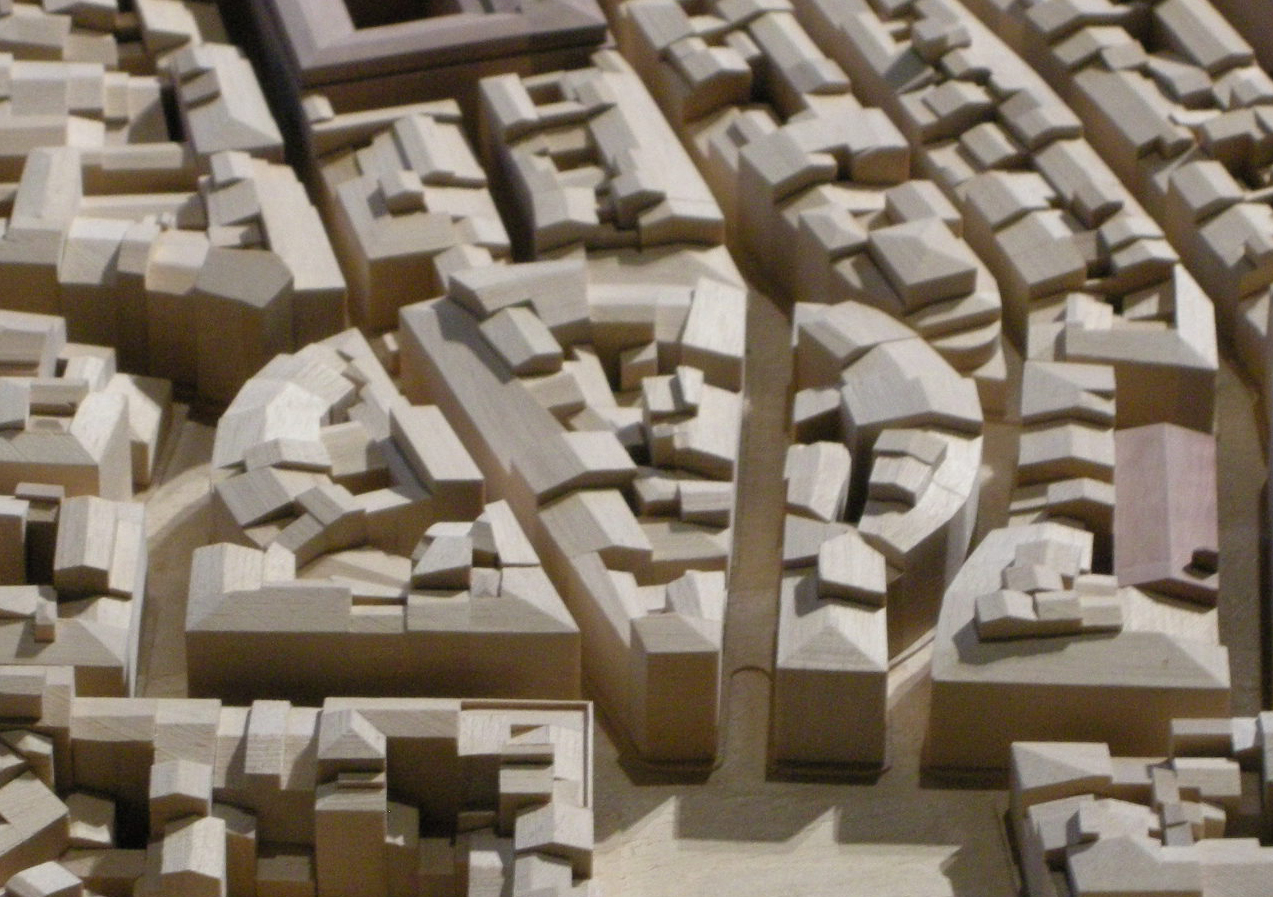 Plastico ligneo di Firenze 12 anfiteatro